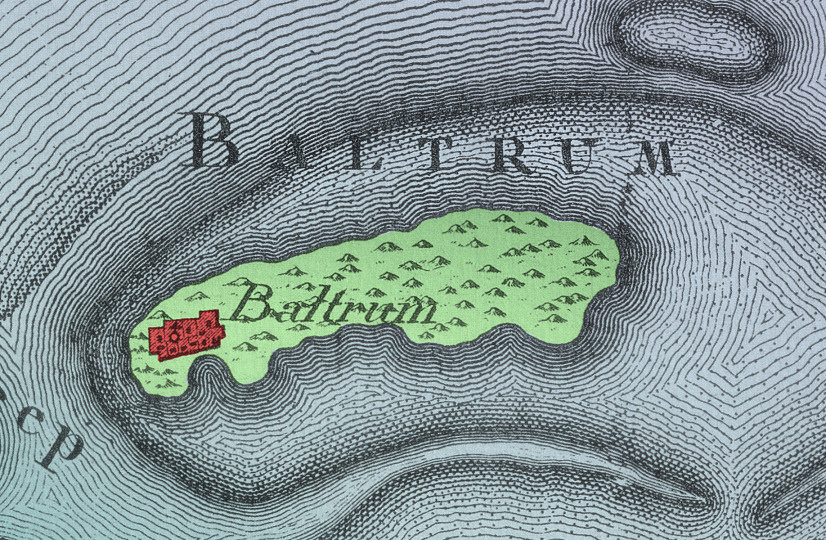 Zeichnung von Baltrum, 1805 angefertigt